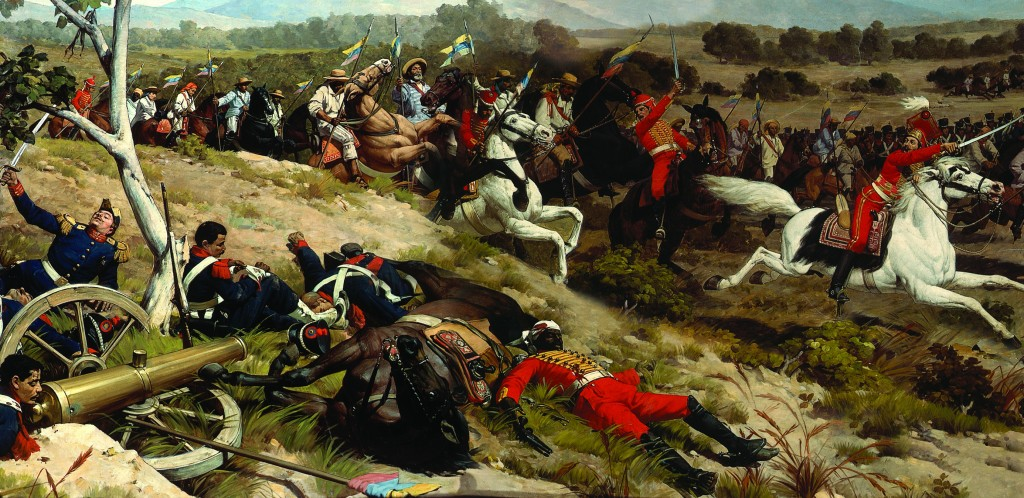 Oleo sobre tela de la Batalla de Carabobo, mural ubicado en el Capitolio Nacional de Venezuela.